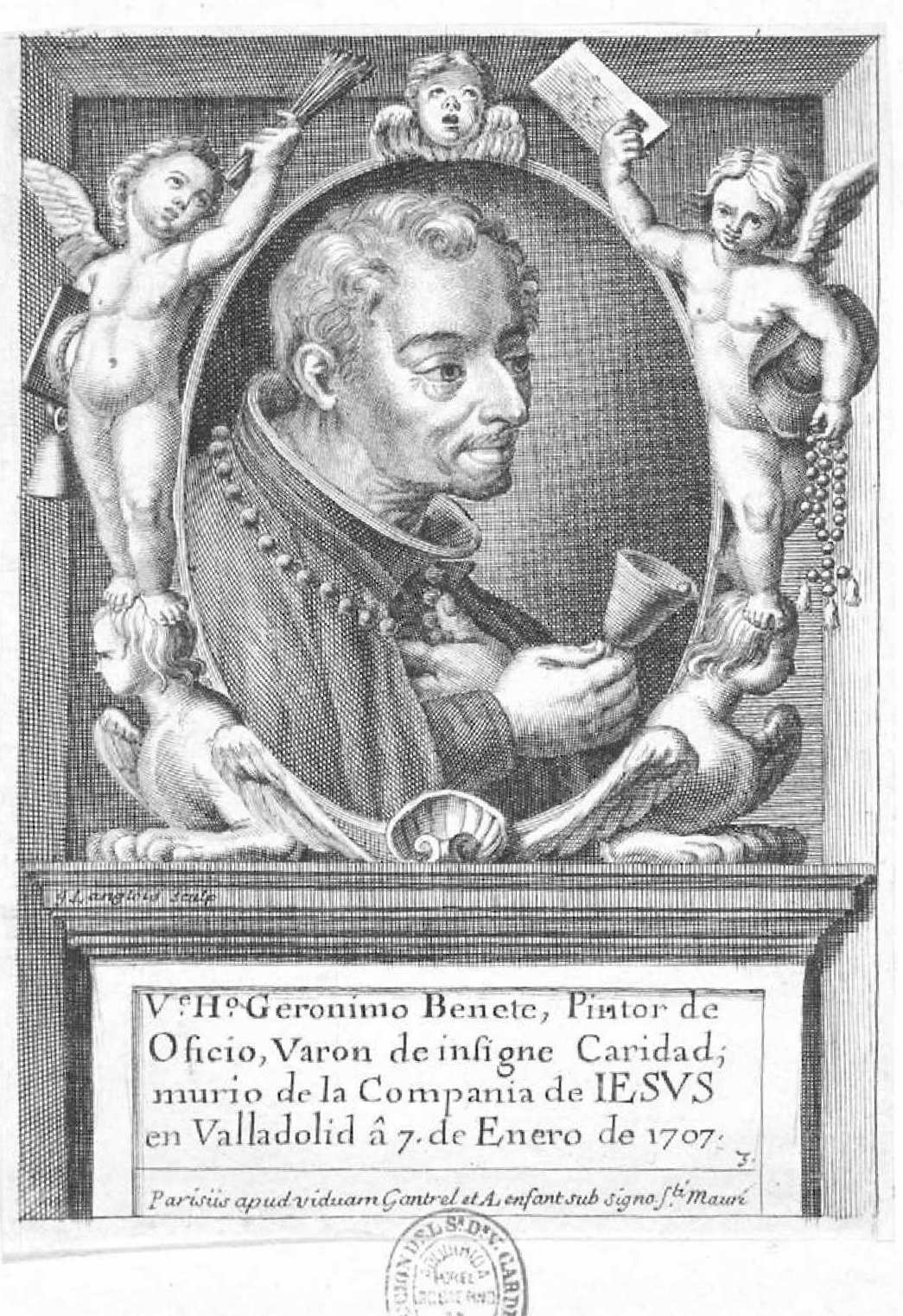 Retrato de Jerónimo Benete, ilustración de Noticia de la vida, virtudes, muerte, y fama postuma, del V. Hermano Geronymo Benete, de la Compañia de Jesus, de Orden de la muy noble, y muy leal ciudad de Valladolid, por el Colegio de la misma Compañia de Jesus de S. Ambrosio, en Valladolid, por Antonio Figueroa. Biblioteca Nacional de España